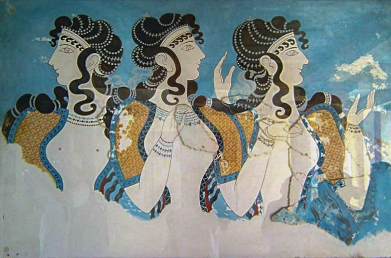 Fresco from Knossos palace